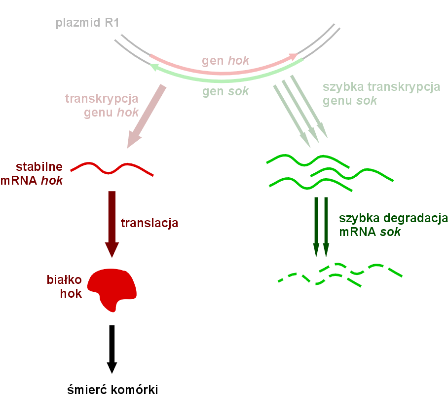 Mechanizm działania systemu hok/sok po utracie plazmidu R1